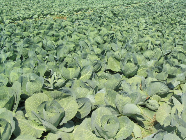 Kohlfeld